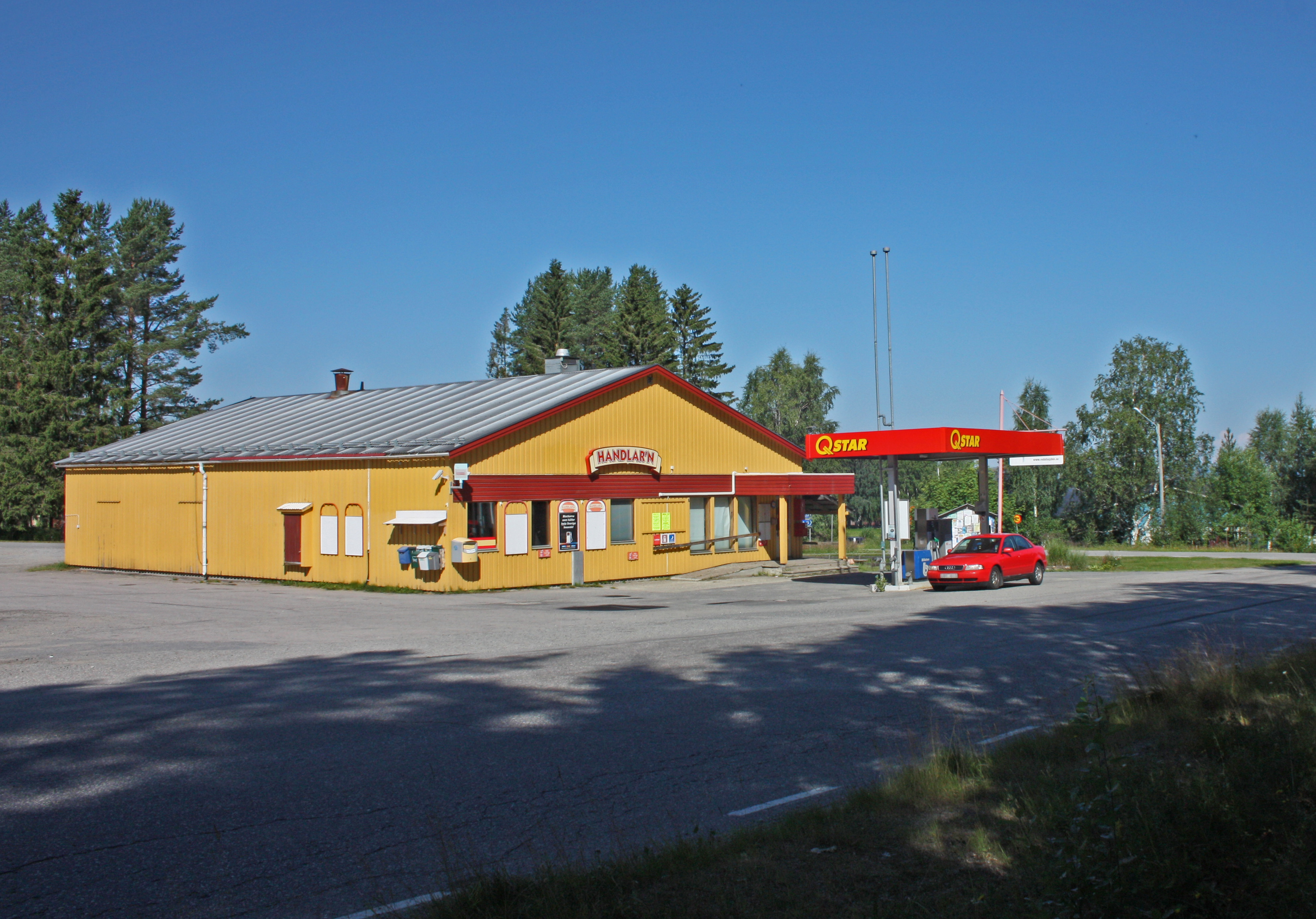 Bensinstationen i Rödåsel